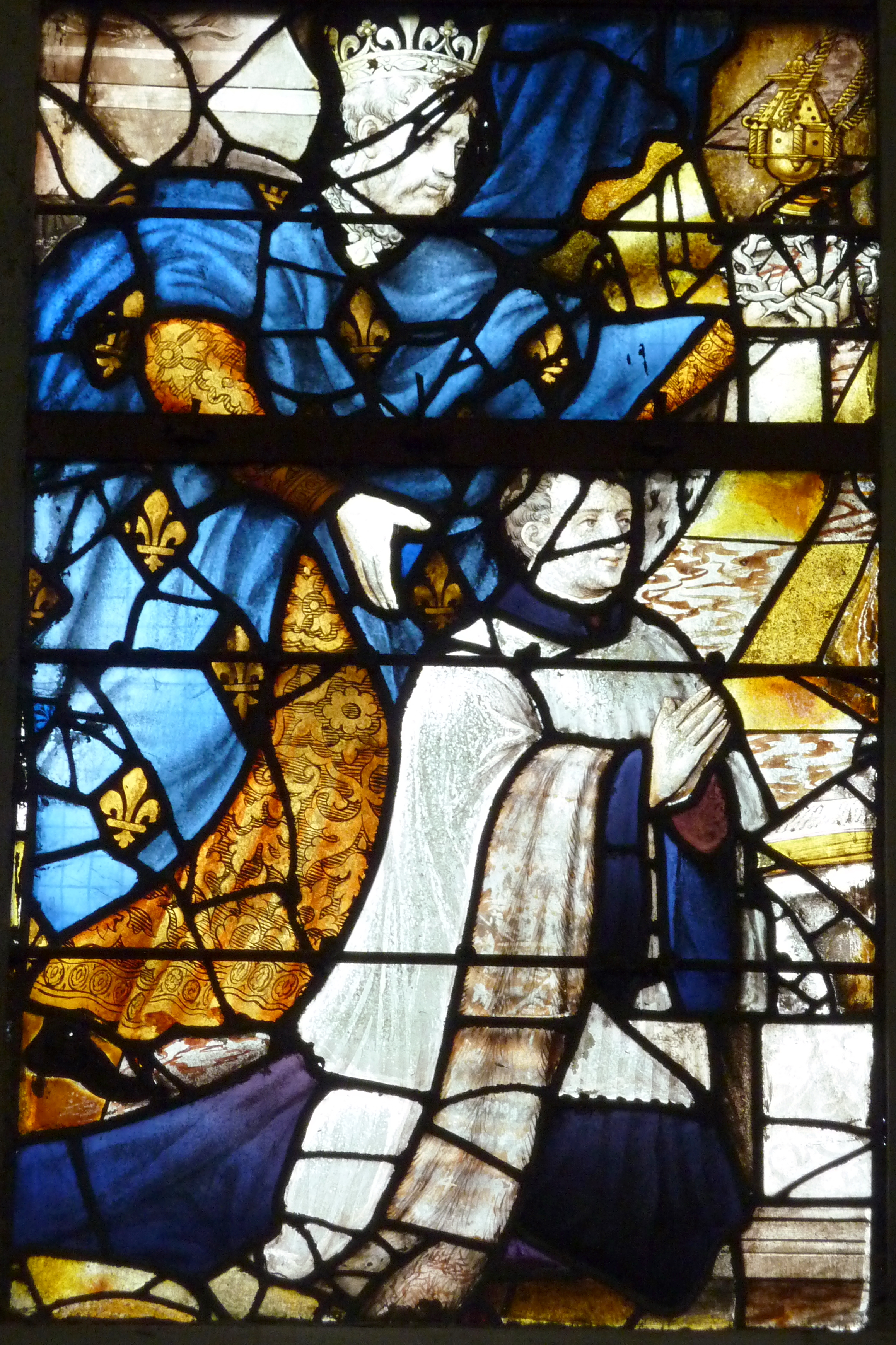 Ausschnitt des Bleiglasfensters Nr. 7 in der katholischen Pfarrkirche Saint-Acceul in Écouen, "Vitrail de la Dormition", um 1544 (siehe Mathieu Lours: Saint-Acceul d'Écouen. Une cage de verre en pays de France, éditée par l’Association Les Amis de Saint-Acceul), Darstellung